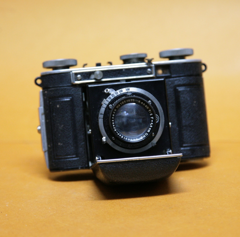 Coll. Marcè CL- Certo dollina I 1935 con obiettivo Schneider Xenon 4.5cm f/2 (6 elementi)[1] e otturatore Compur 300